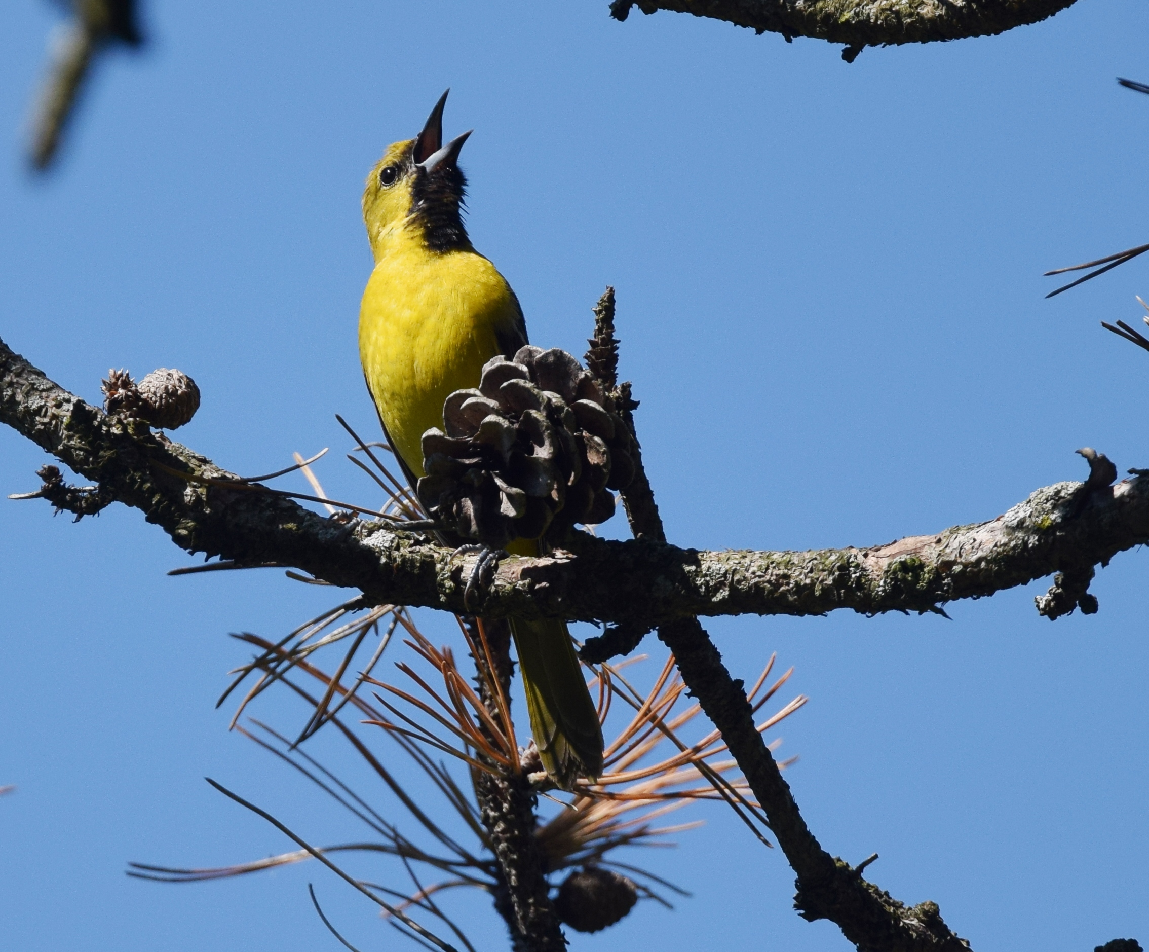 Carondelet Park 5/7/17